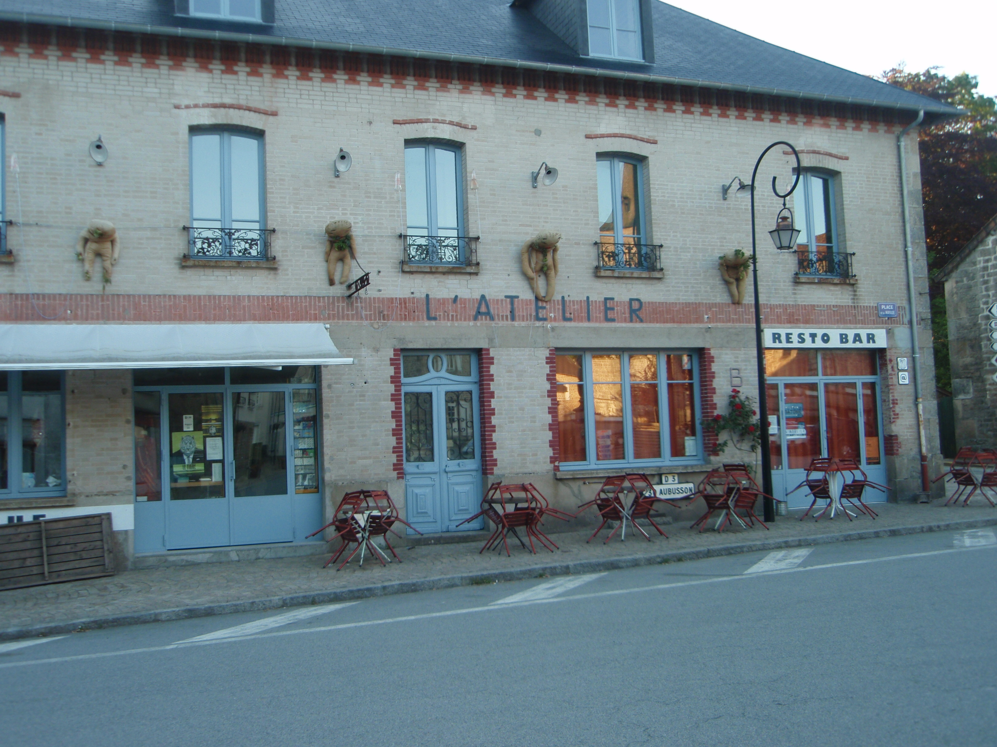 L'atelier, situé place de la Mayade à Royère de Vassiviere dans le département de la Creuse en France.